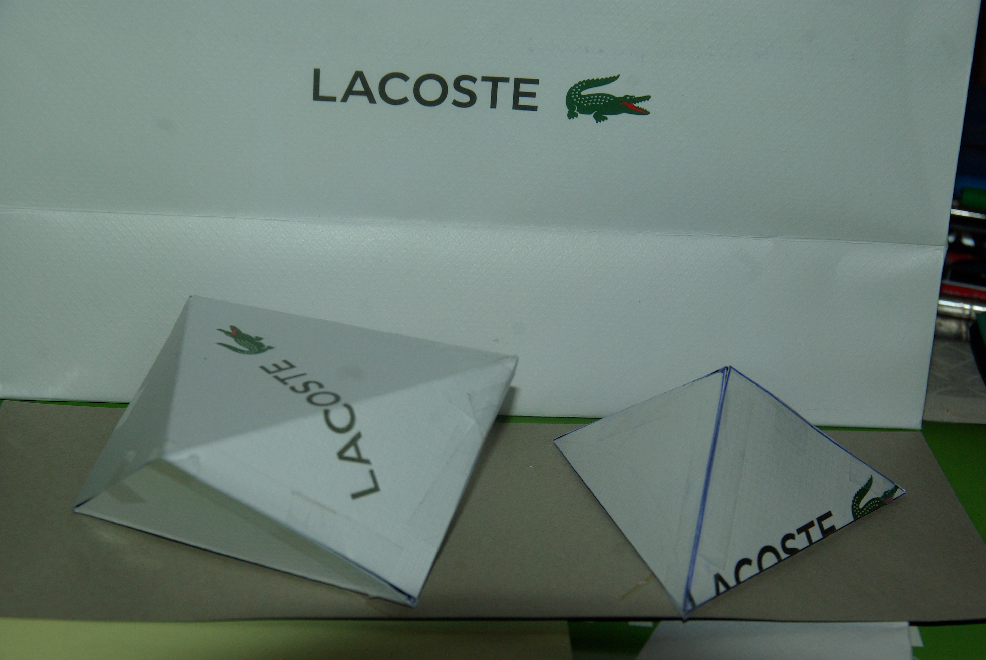 Une décomposition du cube en parties de même hauteur